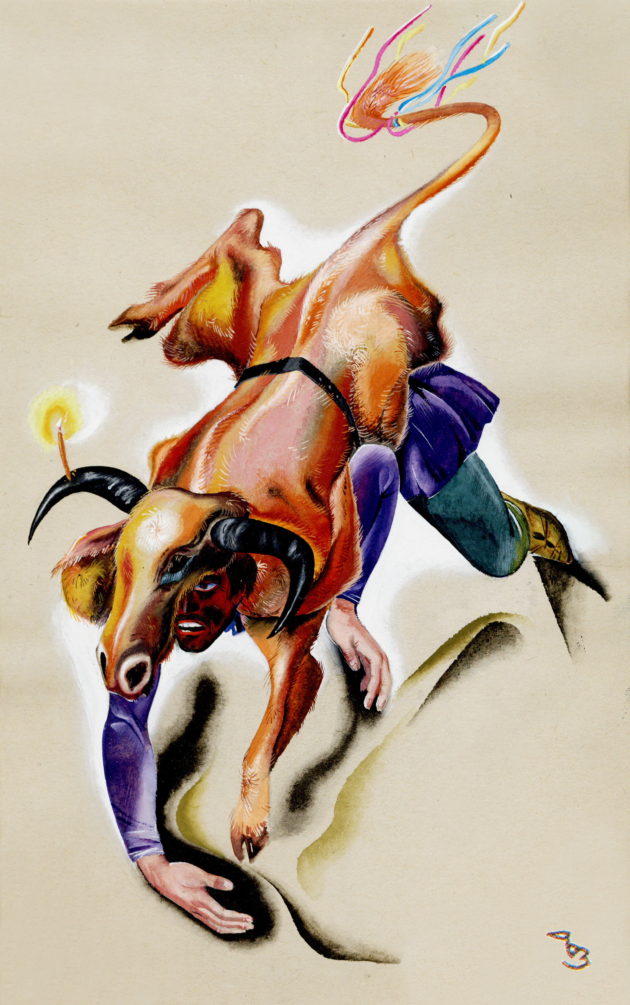 მხატვარი ზურაბ ფორჩხიძე 1966